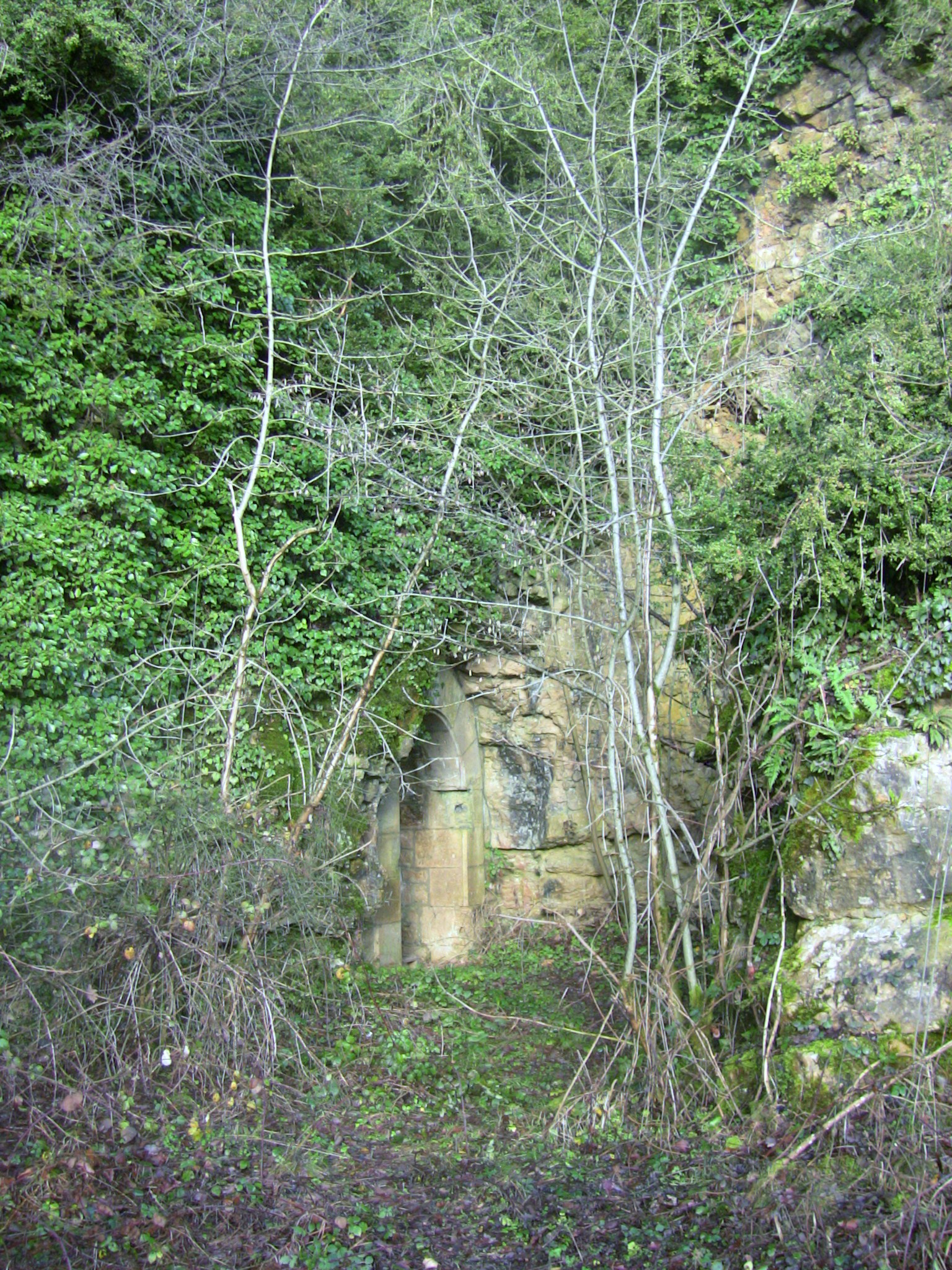 Entrée droite du magasin annexe du fort de Planoise, à Besançon (Doubs, France).